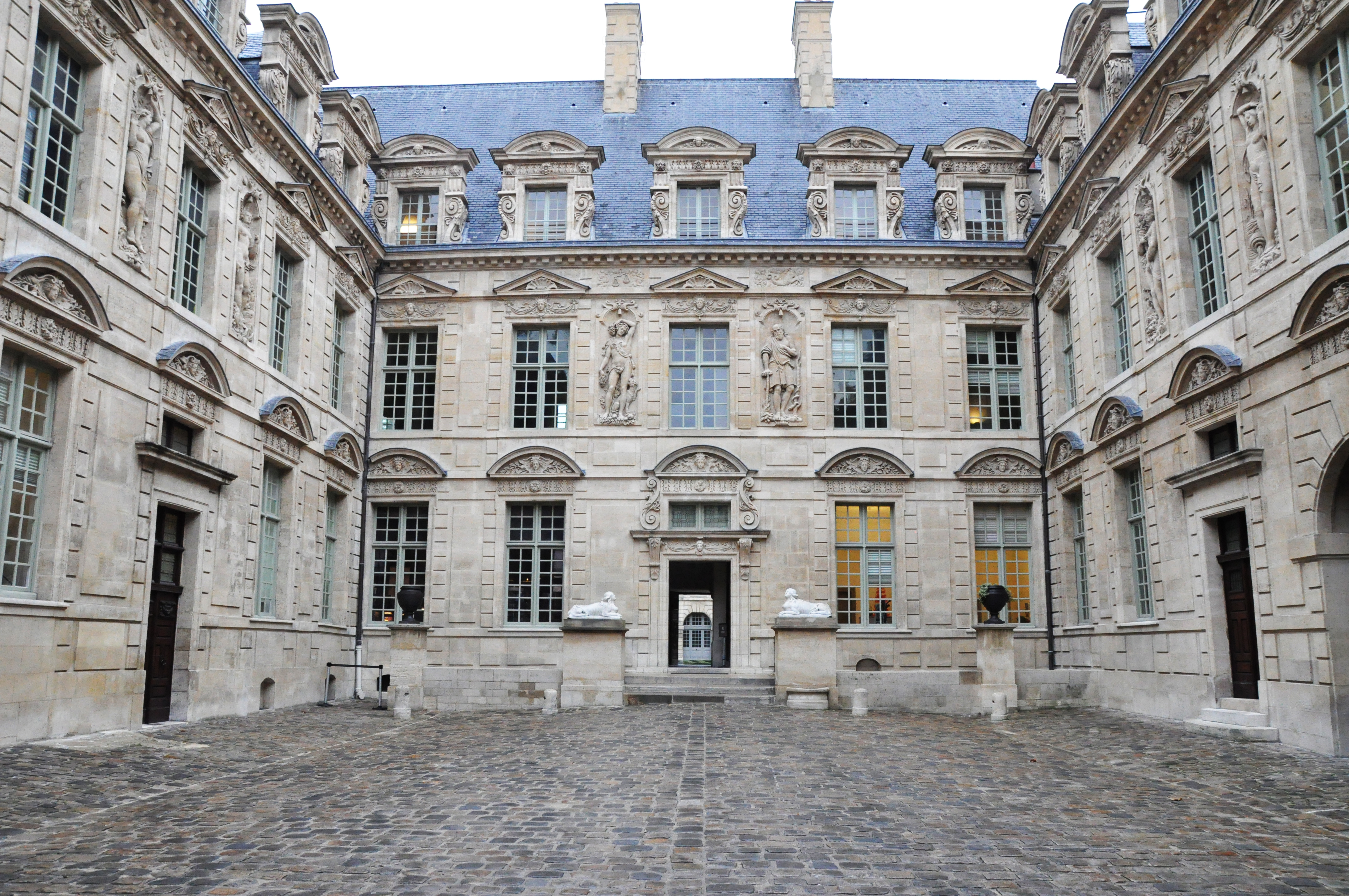 Hôtel de Sully (Paris)